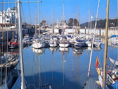 Puerto deportivo de Gelves, Sevilla, España